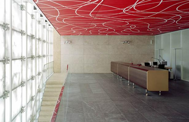 Nástropní malba " Watermelon Cut - Ceiling Dance", 2004. Nová budova Deutsche Bundesbank, Chemnitz, architekt: Josep Lluís Mateo.